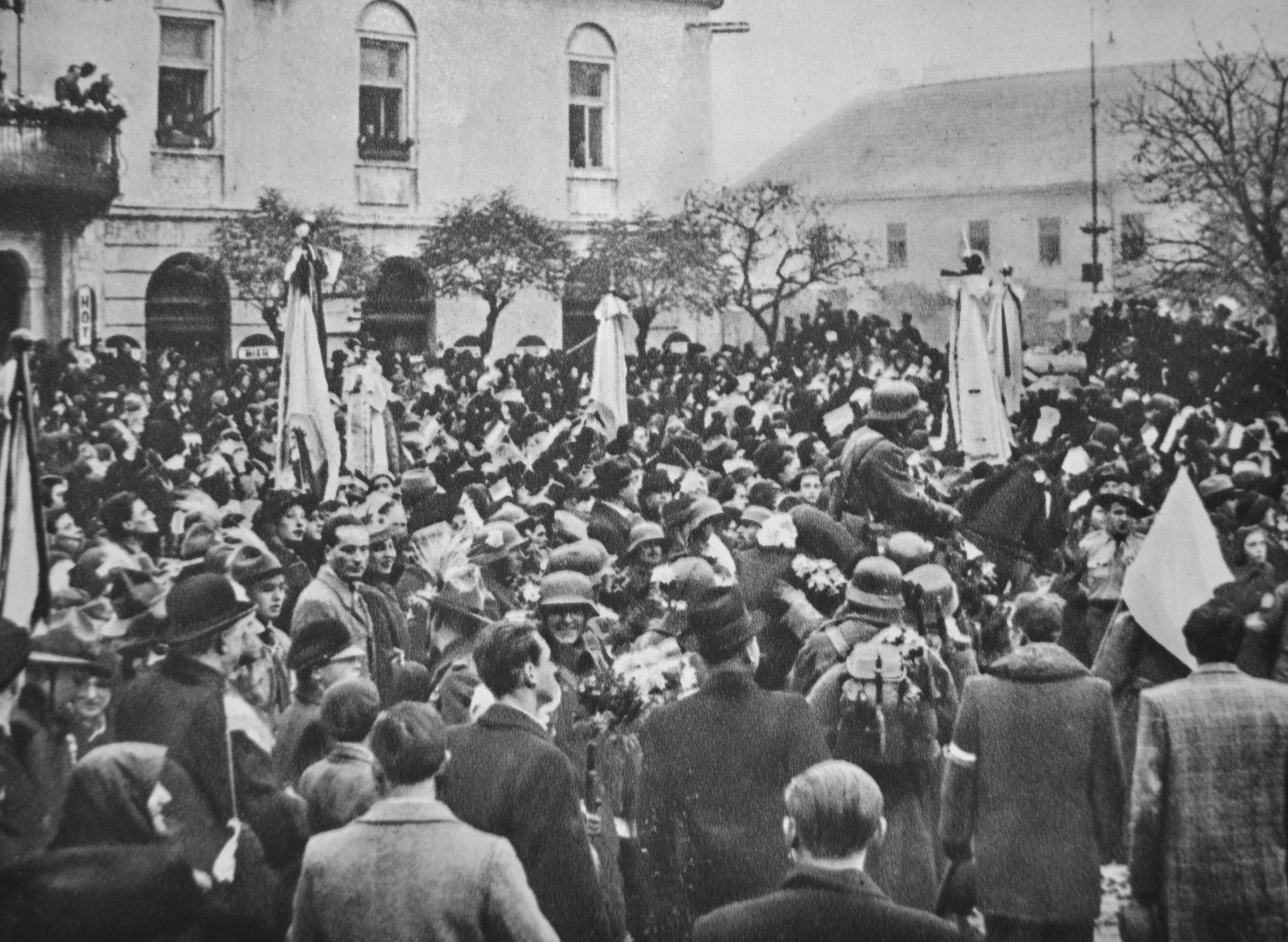 Po prvej viedenskej arbitráži, ktorá sa konala 2. novembra 1938, 8. novembra pripadli Nové Zámky Maďarsku (pohľad na Hlavné nám.)